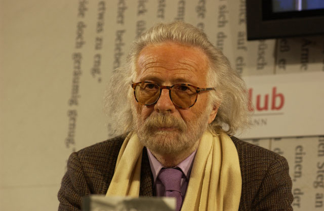 Fritz J. Raddatz. Dieses Foto dürfen Sie honorarfrei nutzen, wenn Sie folgenden credit beachten: Copyright: Das blaue Sofa / Club Bertelsmann.